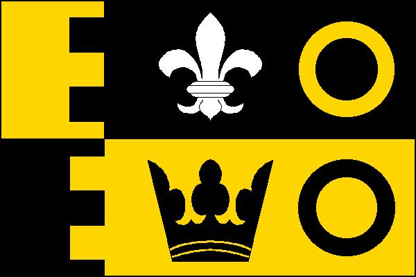 Vlajka obce Staré Místo